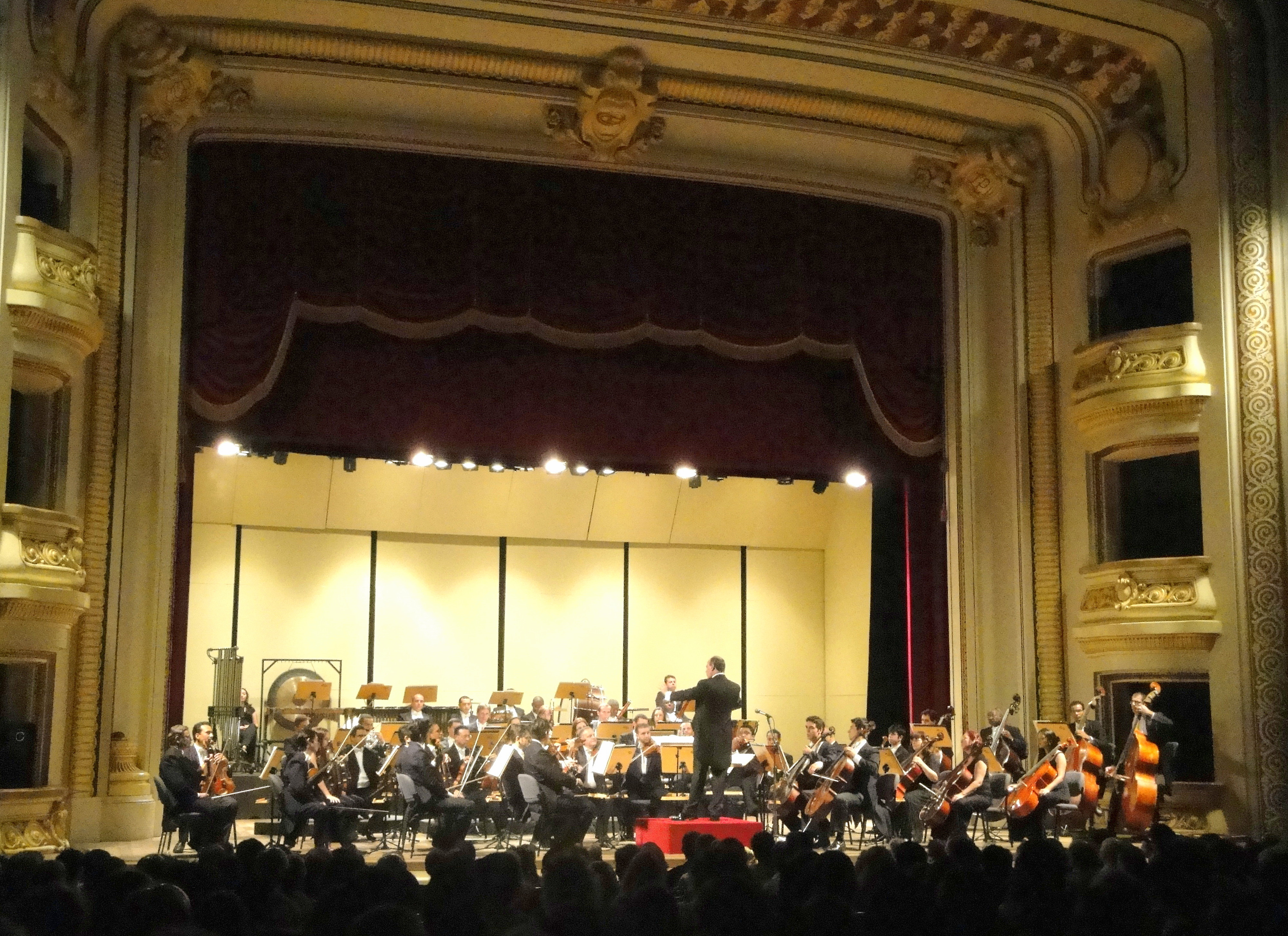 Orquestra Sinfônica de Ribeirão Preto (OSRP) Apresentação no Theatro Pedro II com o Regente Cláudio Cruz